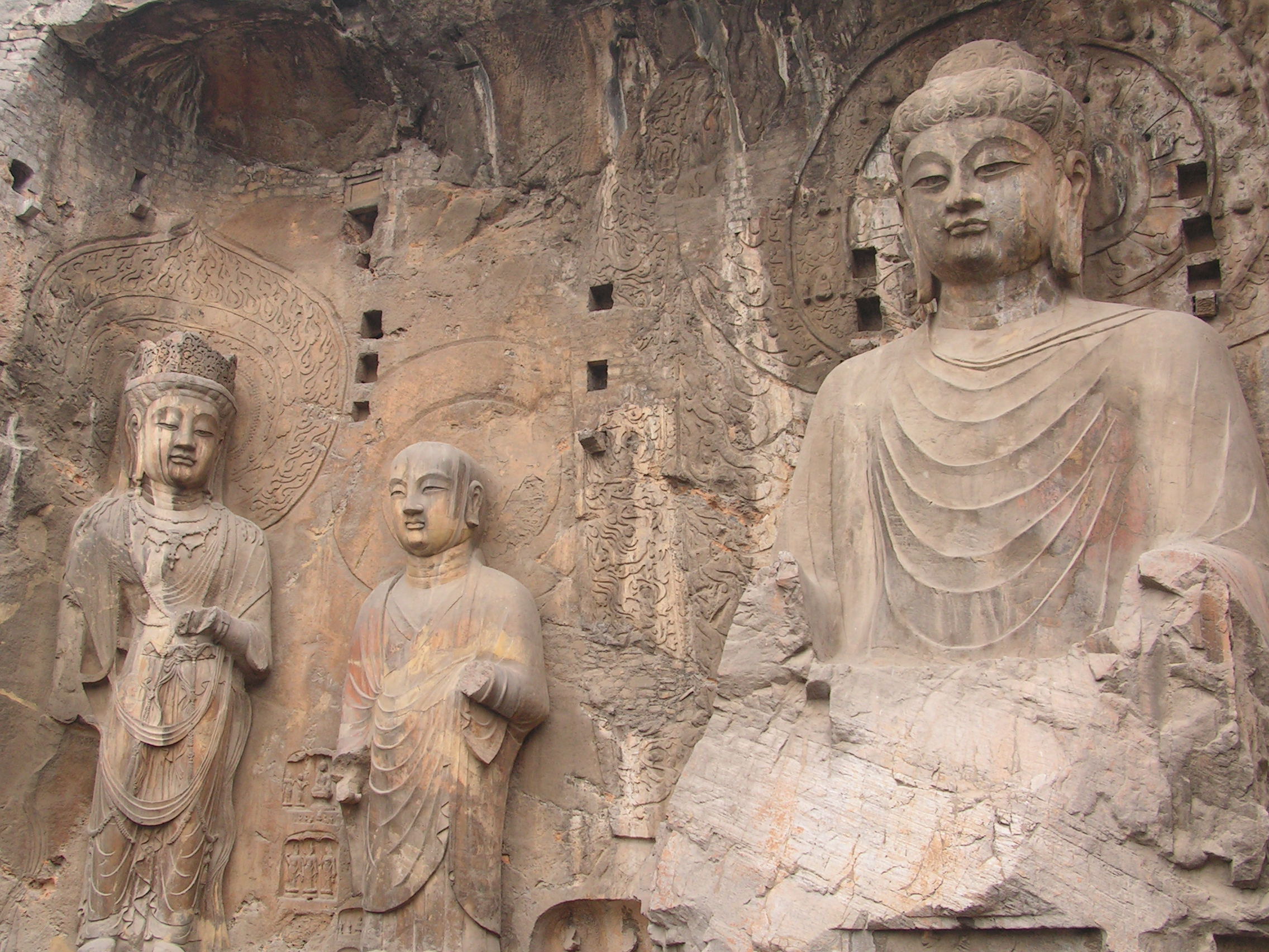 Grotten van Longmen